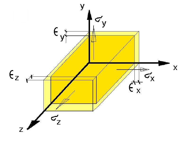 מצב מאמצים ומעוותים מרחביץ הכין י.ש. 15:10, 3 יוני 2006 (IDT)